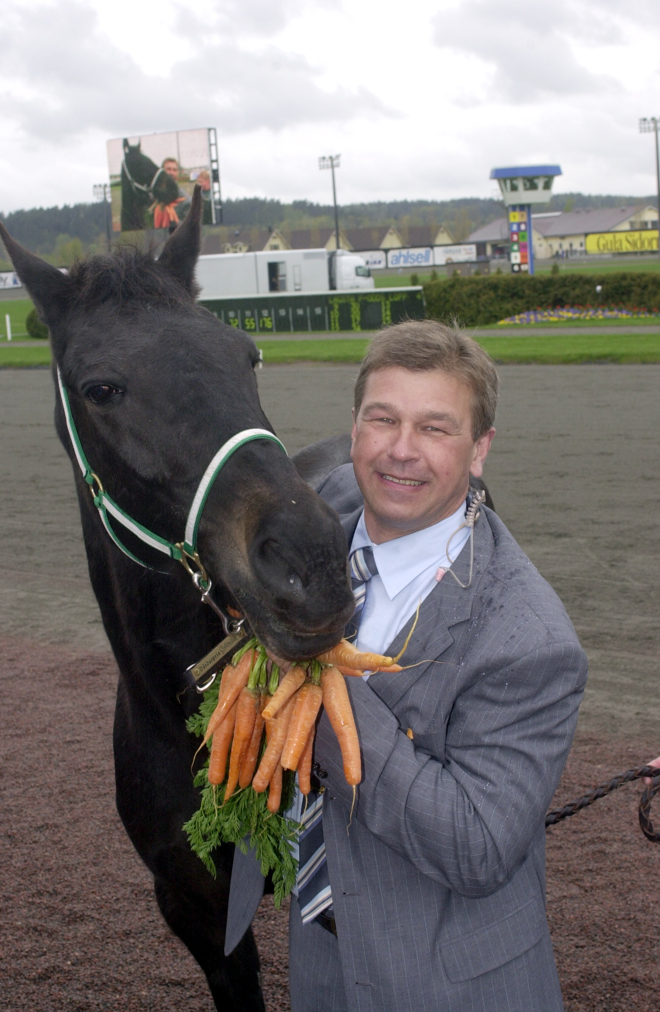 Travkusken och travkommentatorn Thomas Nilsson.